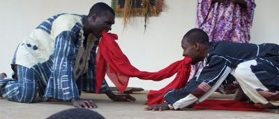 Photographie prise lors du spectacle Triotogota, à Yo (Togo) en 2006.